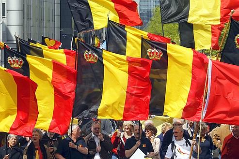 Manifestation patriotique